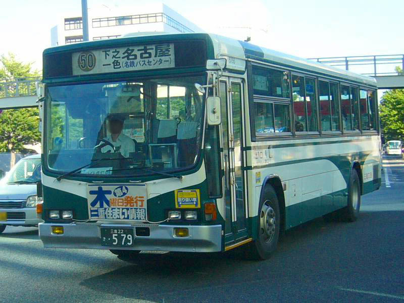 登録番号 三重22き・579 三重交通所属 名古屋近郊の高速用 2006年7月27日 名鉄バスターミナル入口付近にて撮影